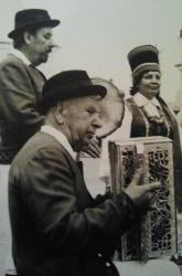 Ignacy Mielnicki, Ostrołęka, gra na harmonii pedałowej